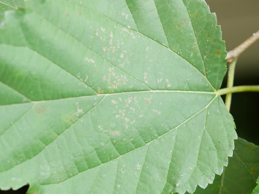 2019/07/25 和歌山県日高川町：Hidakagawa Town, Wakayama Pref. Japan.